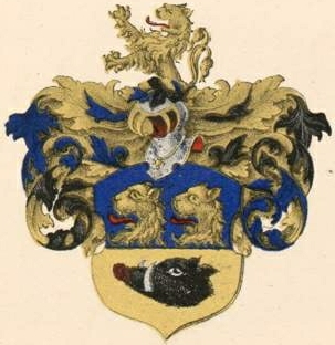 Rassi suguvõsa aadlivapp